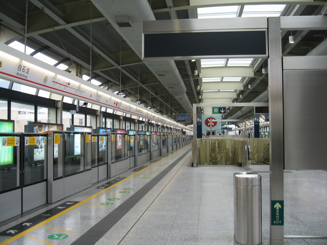 深圳地铁白石龙站站台